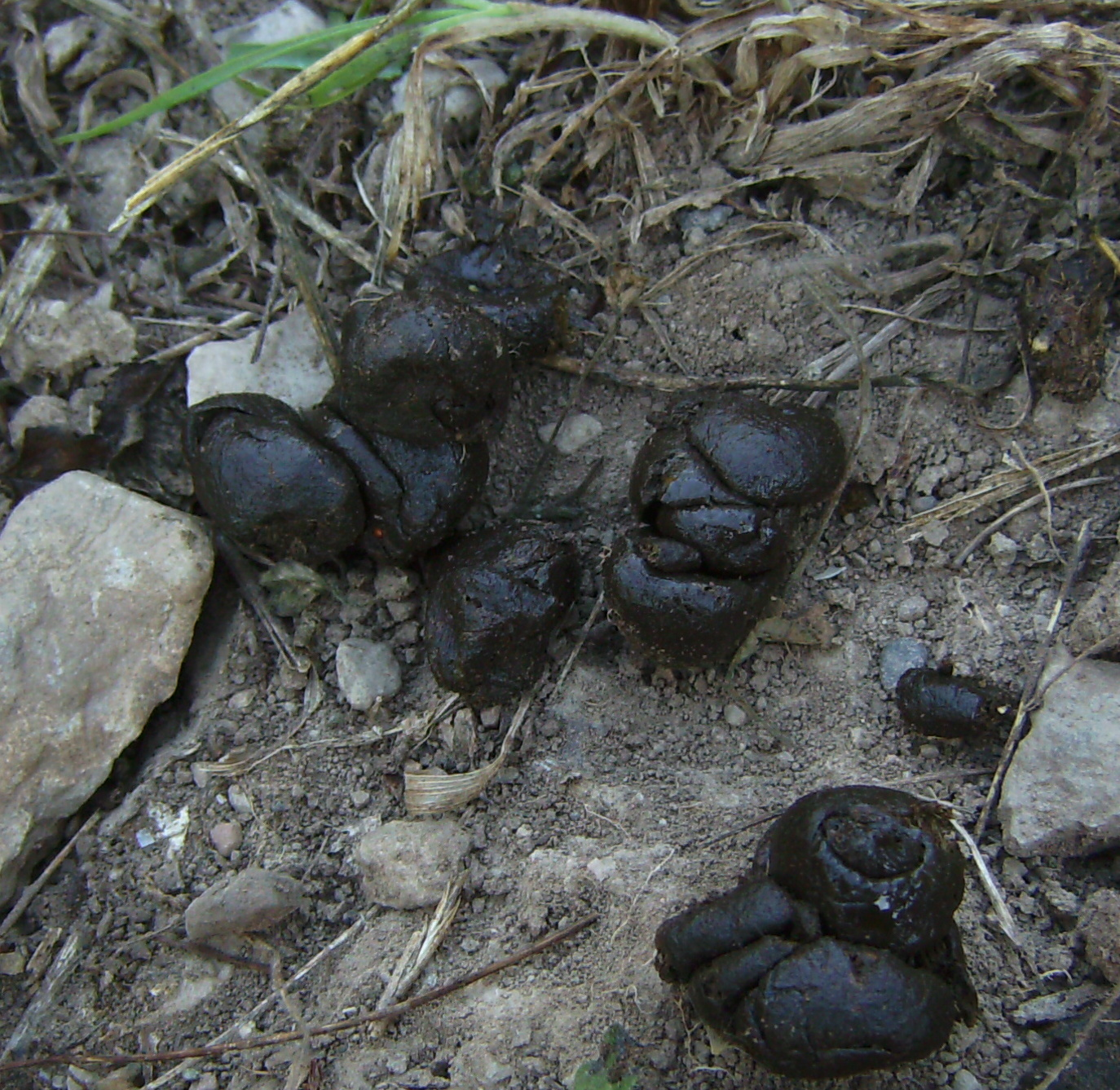 Capreolus capreolus drops, Castelltallat, Catalonia